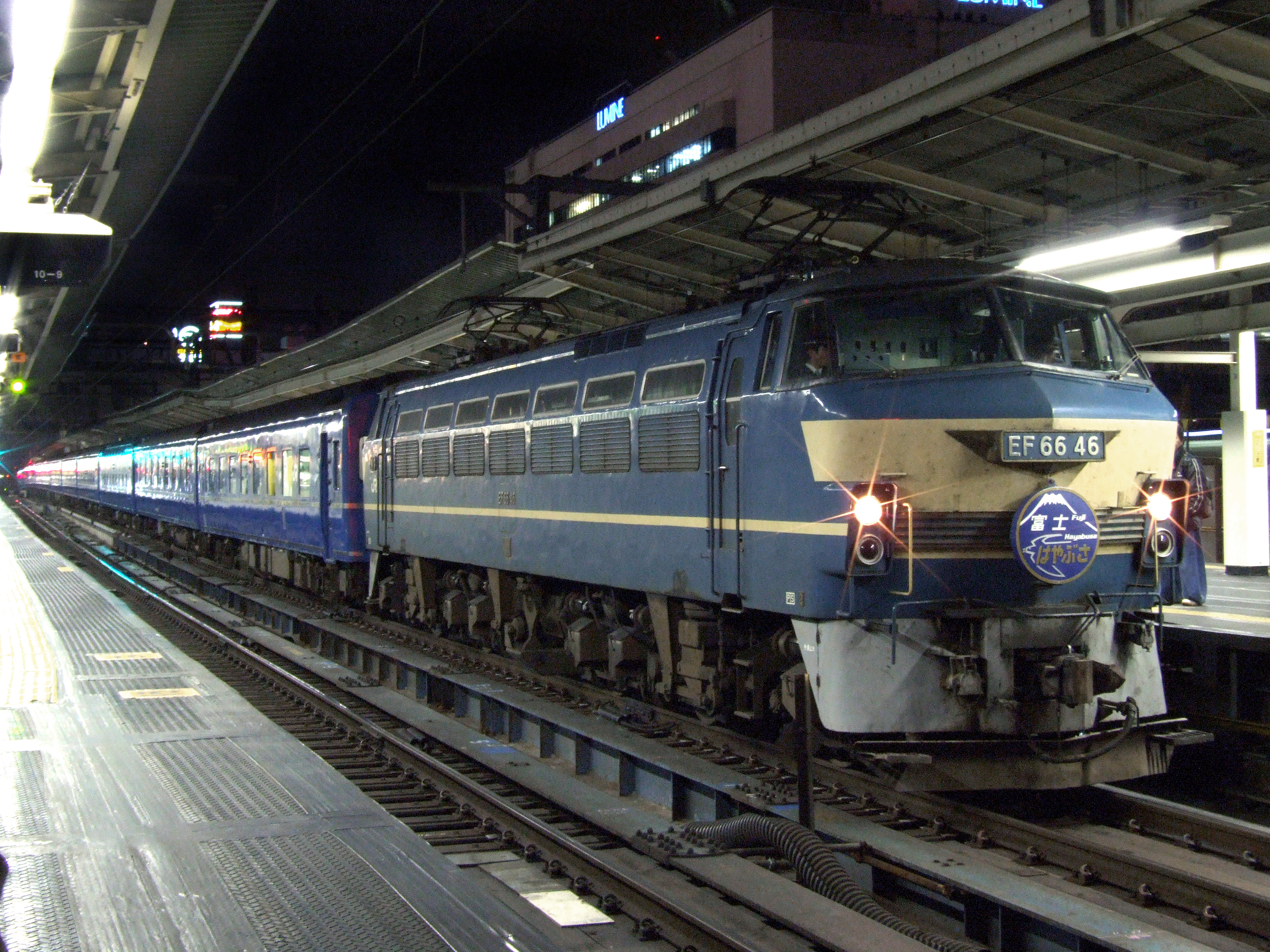 横浜駅でのはやぶさ・富士